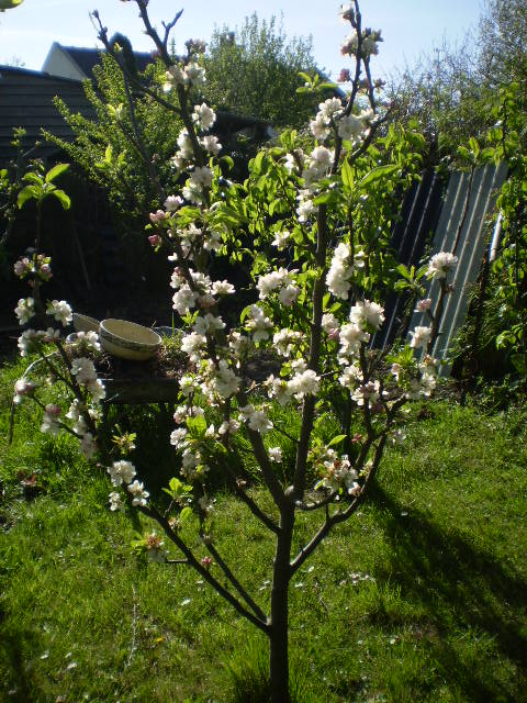 Pommier Malus 'Reinette Clochard'